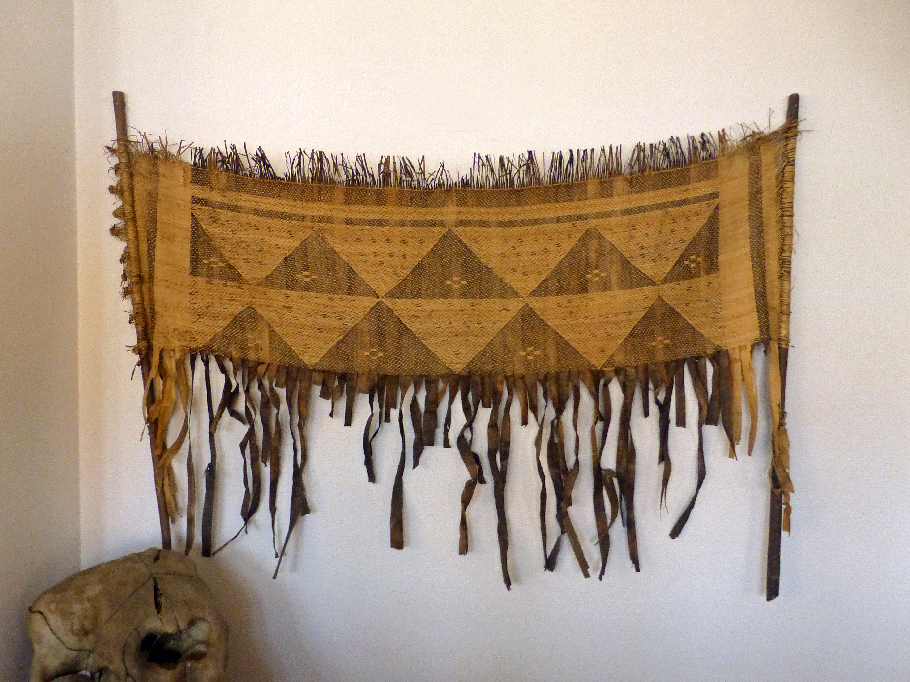 Musée africain de Gunsbach (Haut-Rhin) : natte en palme non achevée